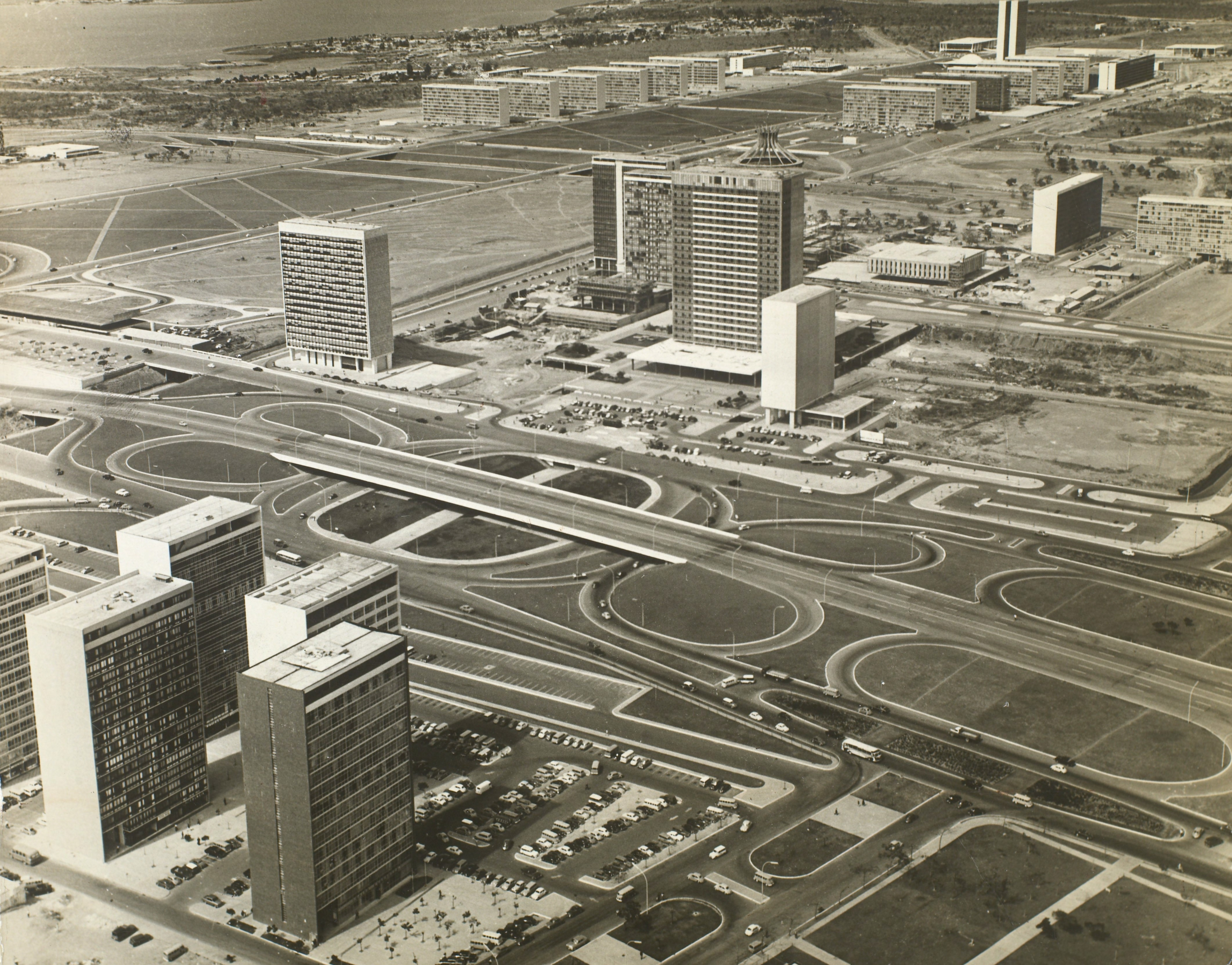 Fotografia do Fundo Correio da Manhã, sob a guarda do Arquivo Nacional.